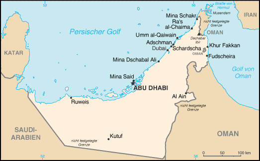 Karte der Verein. Arab. Emirate